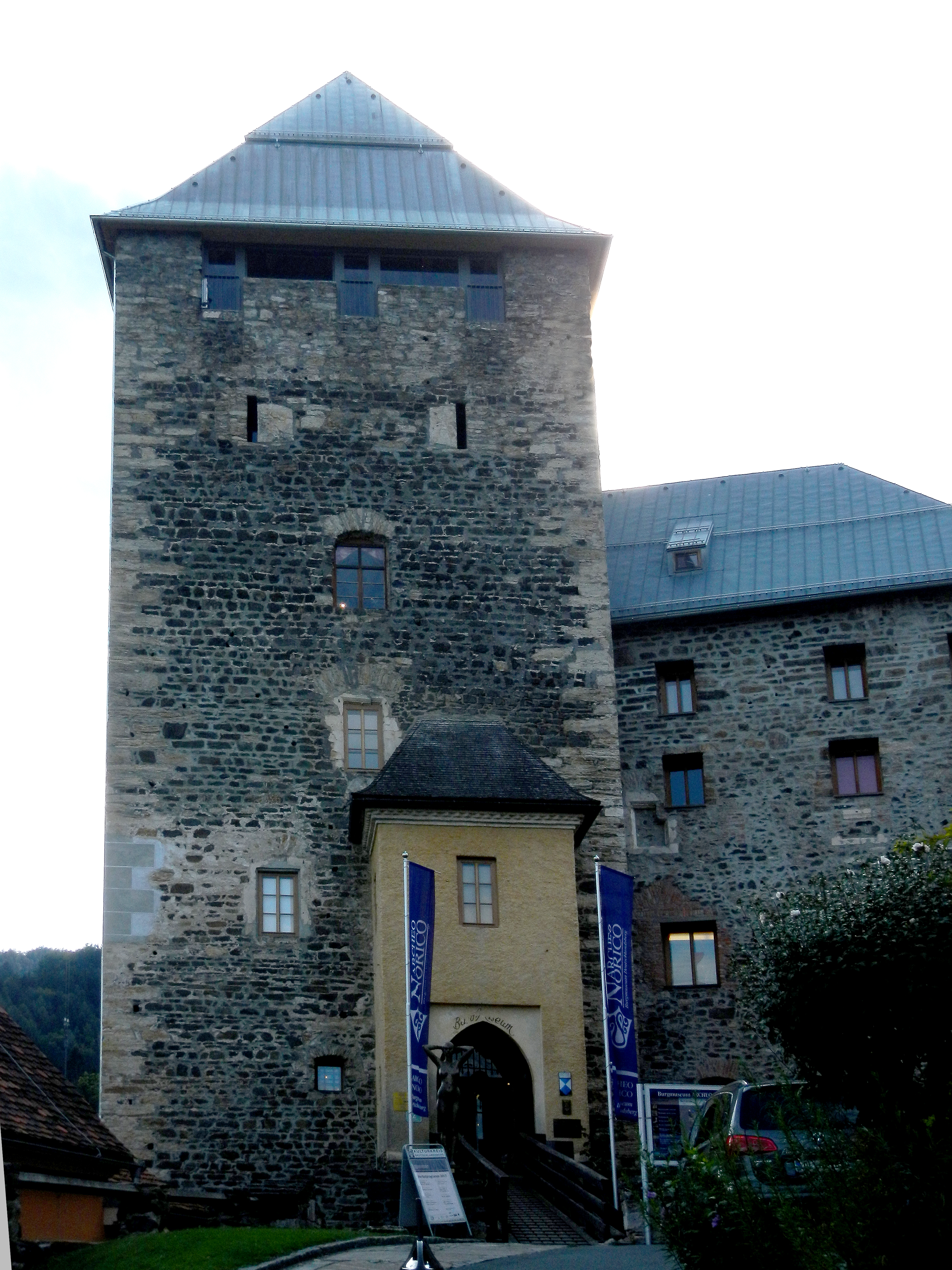 Burg Deutschlandsberg, Steiermark, Österreich